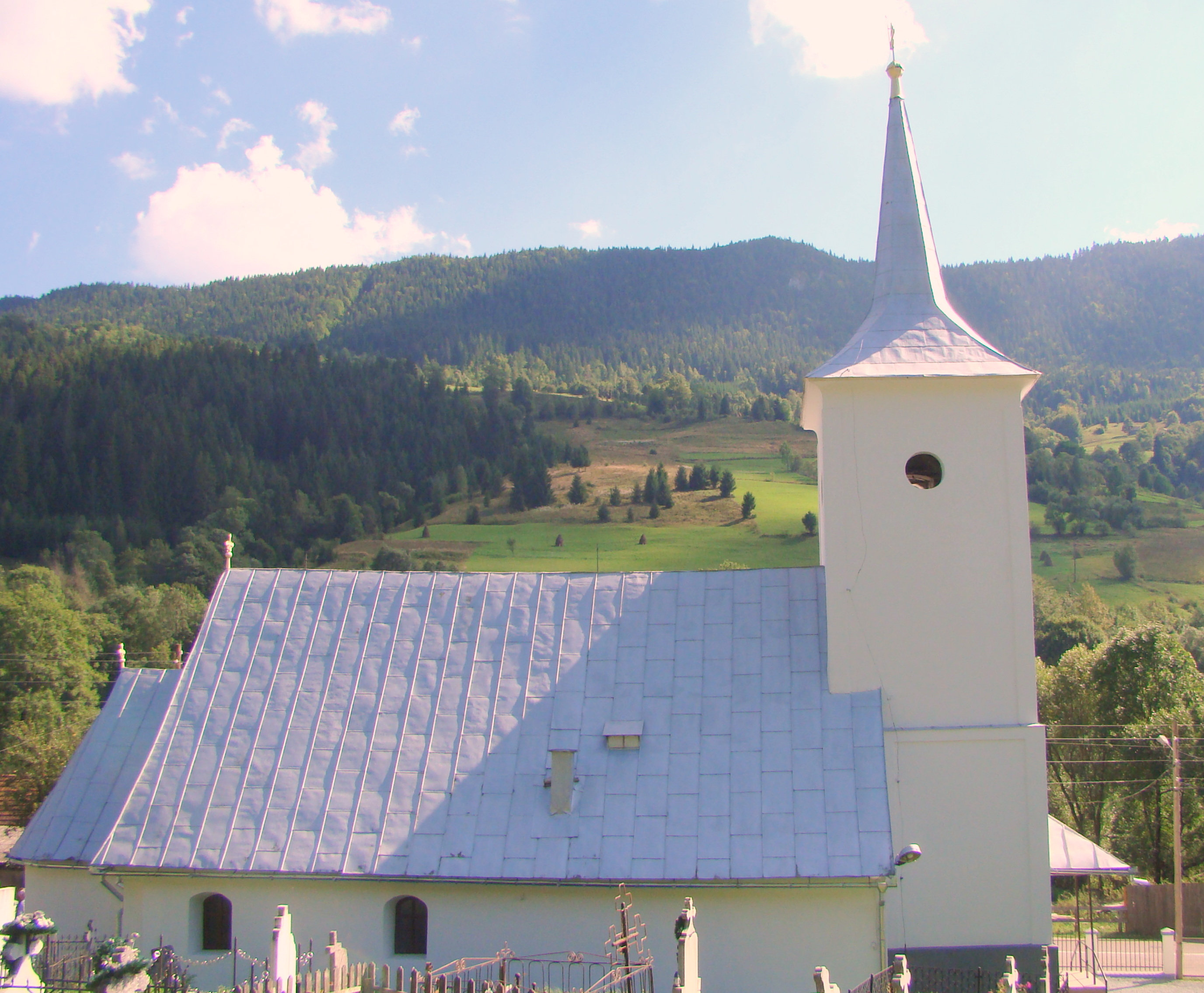 Biserica „Sf. Arhangheli”, sat Vidra; comuna Vidra